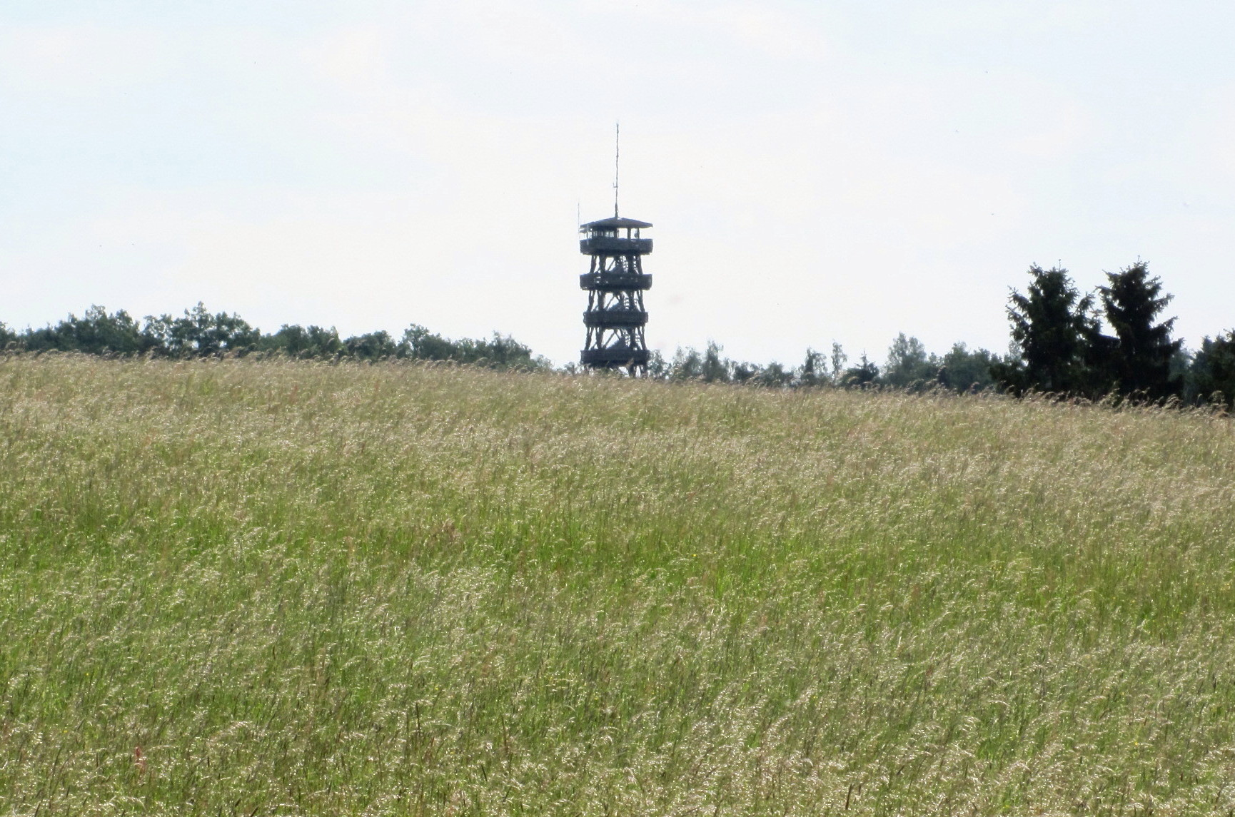 Feuerwachtturm Wolfgarten